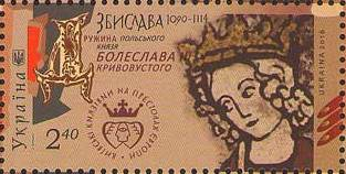 Марковий аркуш «Київські князівни на престолах Європи» «Анна. 1032—1075» «Малфрідь (Малмфред). 1095/1102-1137» «Вишеслава (Вислава). 1047—1089» «Єфимія (Євфемія). 1096—1138» «Євпраксія—Адельхайра. 1071—1109» «Єлизавета—Елісів. 1025—1076» «Анастасія—Агмунда. 1020—1074/1094» «Збислава. 1090—1114» «Доброніга (Доброгніва)—Марія. 1012—1087» «Предслава. 1090—1109» «Євпраксія (Добродія)—Ірина. 1108—1172» «Єфросинія (Фрузіна). 1130—1193»